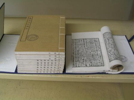 中國古籍。